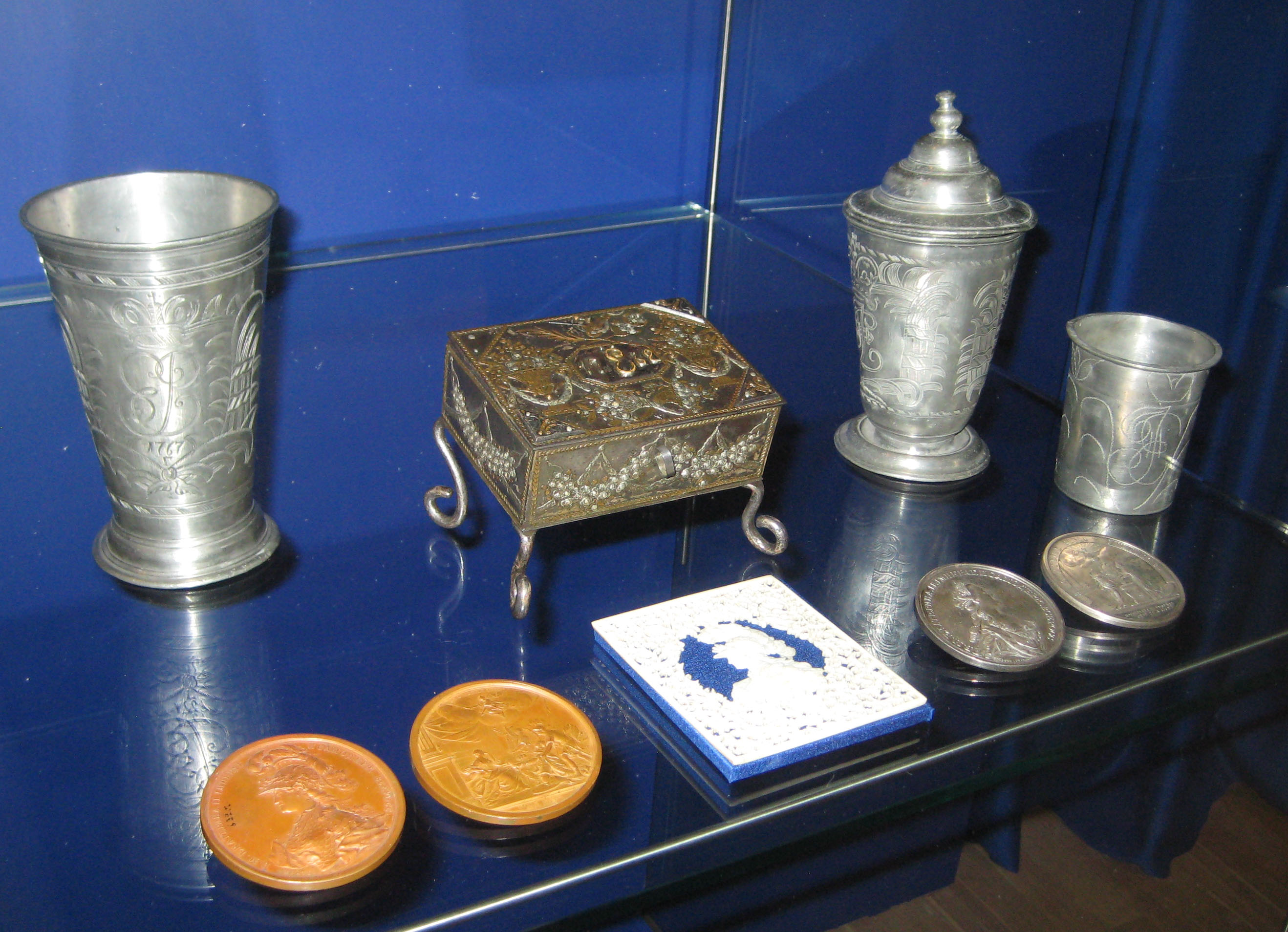 Плакетка "Екатерина II - Минерва", мамонтовый бивень; Шкатулка оловянная (Тула); Медаль на вступление Екатерины на престол; Медаль в память коронования, Стопа кронационная, Кубок коронационный, Стакан с вензелем Екатерины II. Олово, ГИМ